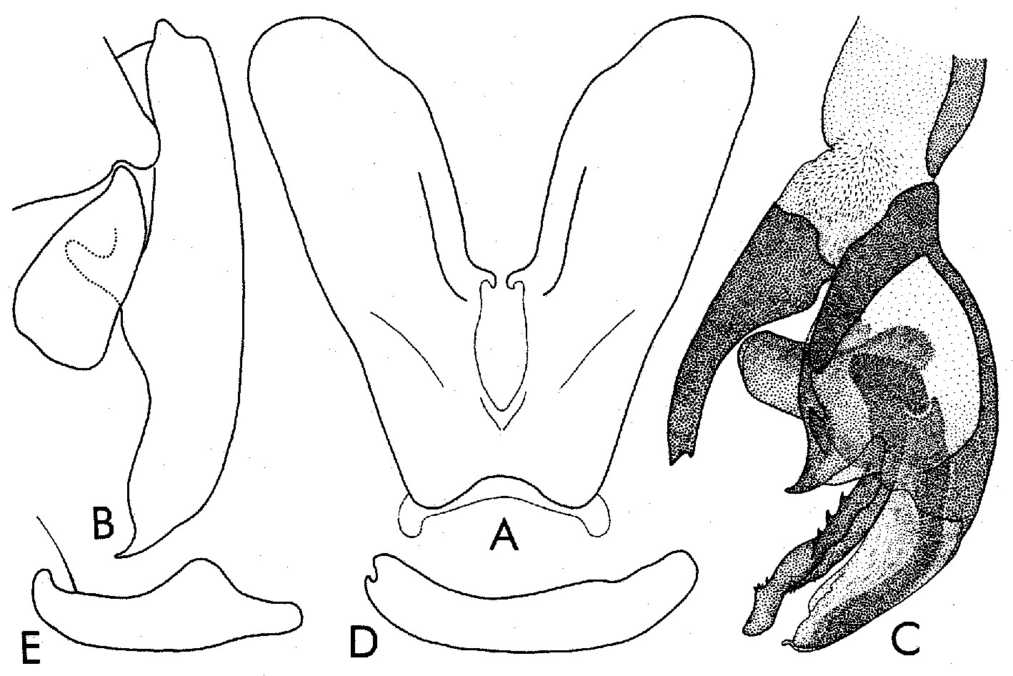 Genitalia speciei Hyperacanthisca susteriana Lehrer, 2003. Operã personalã Andy Z. Lehrer, 2003